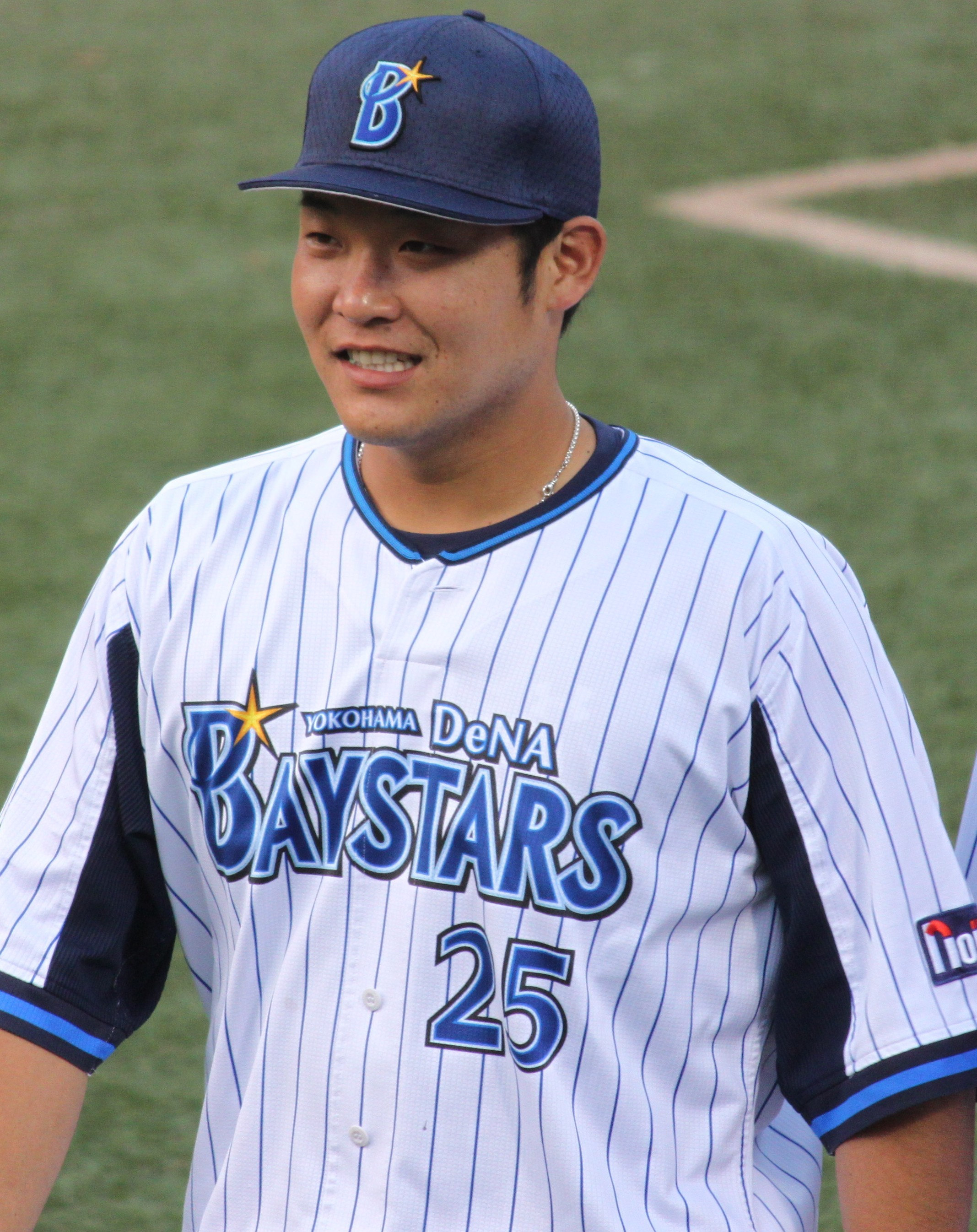 横浜DeNAベイスターズ内野手の筒香嘉智。横浜スタジアムにて。